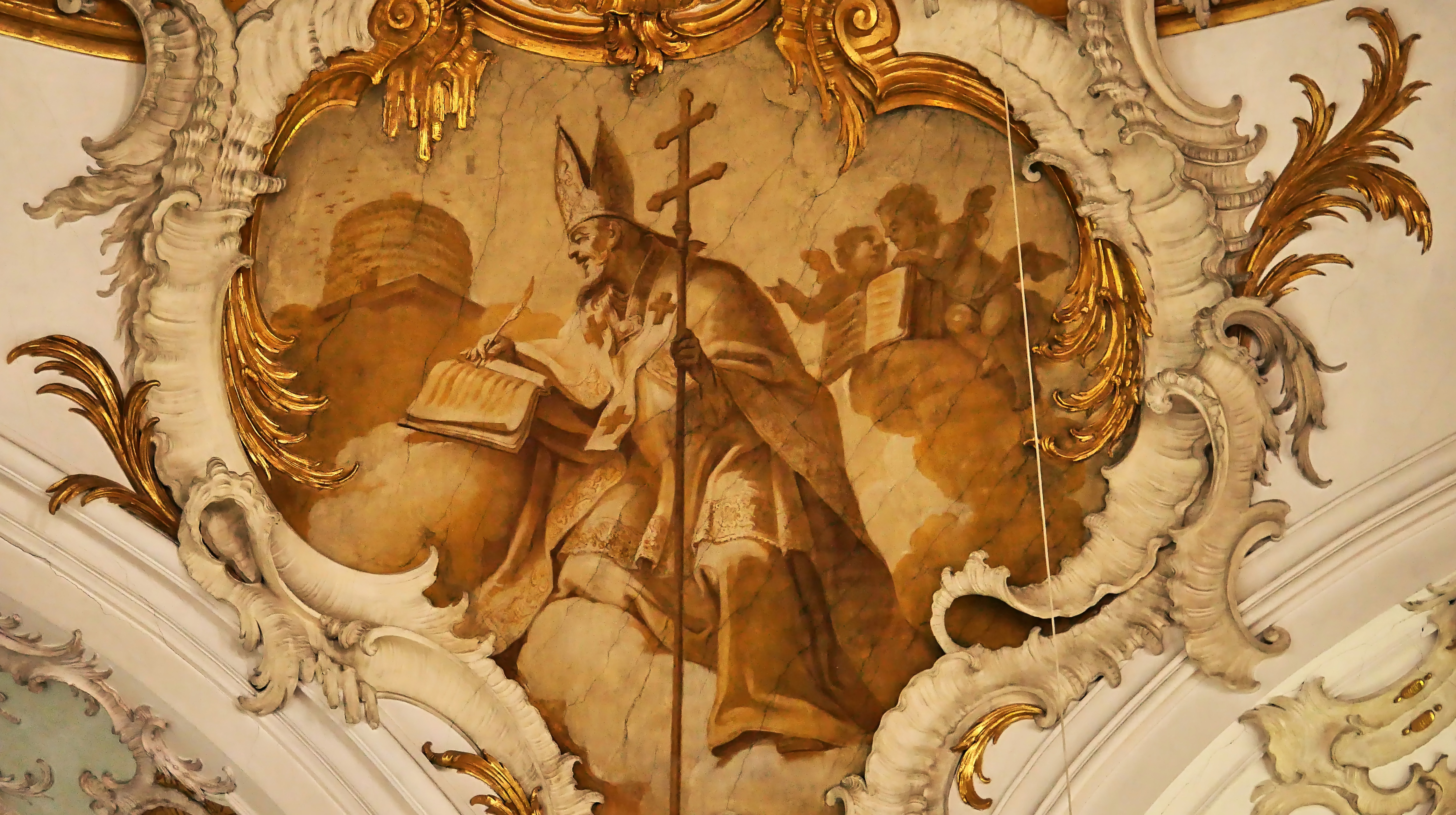 Wallfahrtskirche Maria Steinbach - Kirchenvater Hl. Ambrosius